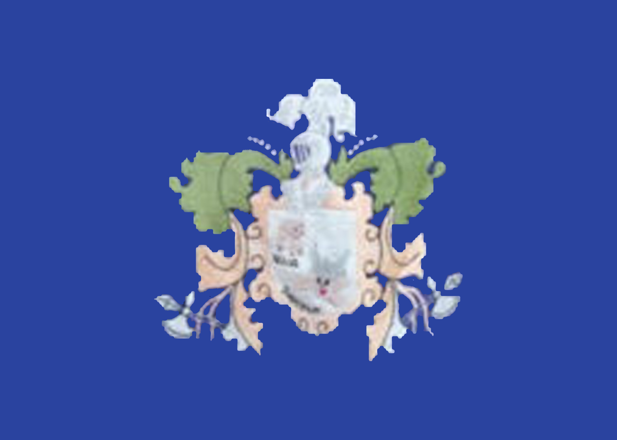 Bandera del Barrio de Villatoro (Burgos)